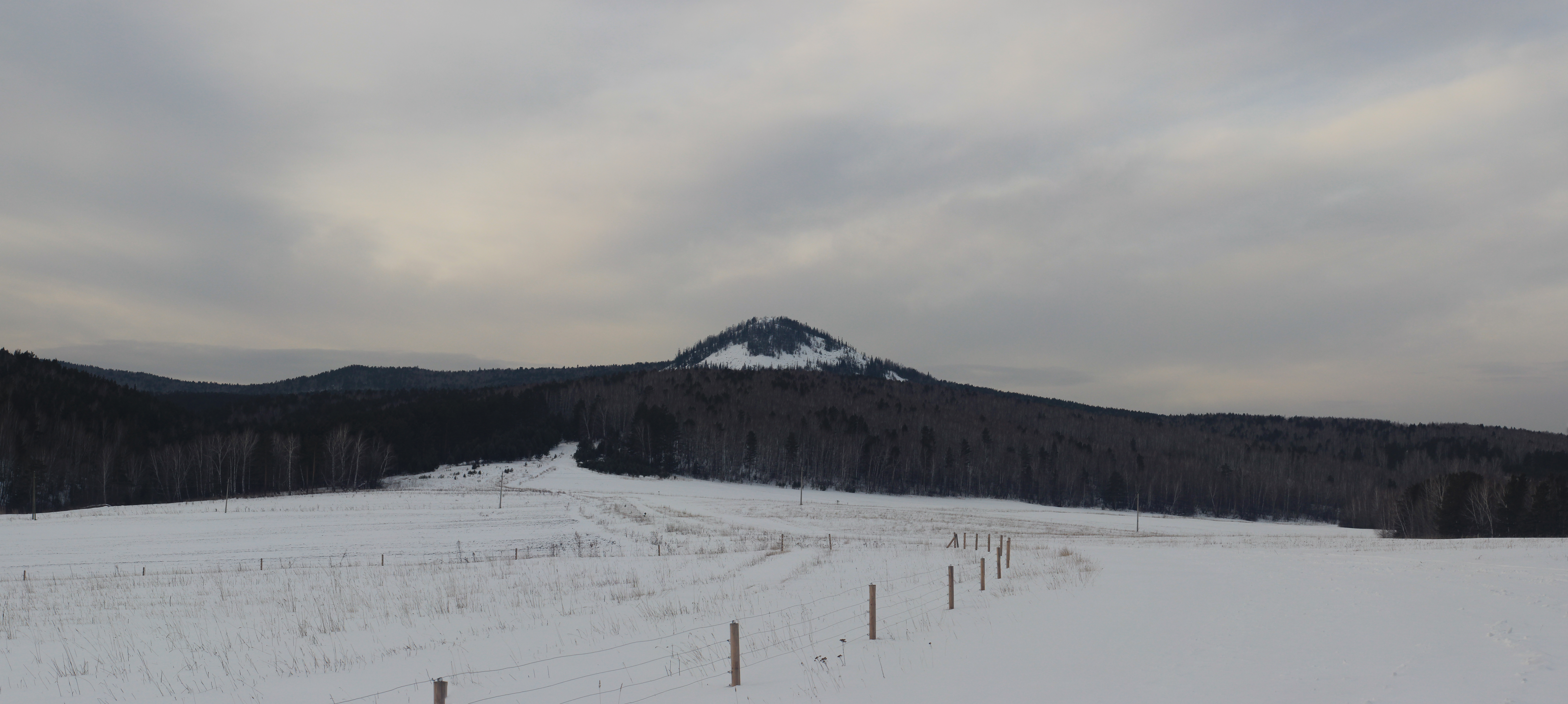 Чёрная сопка: Березовский район, Красноярский край Вид на гору Чёрная сопка с тропы от железнодорожной станции Зыково. This image is related to the protected area of Russia number 2410228